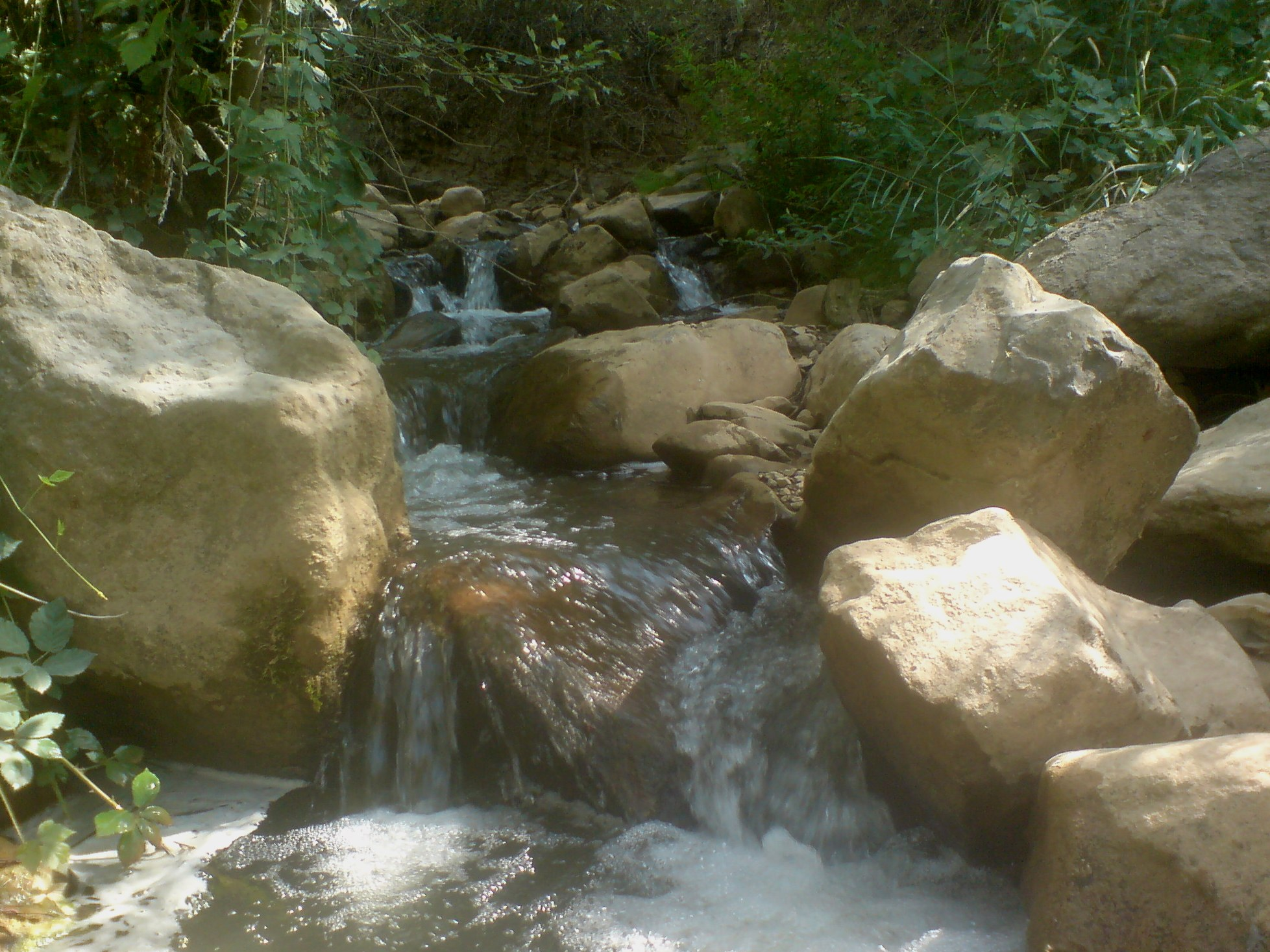 Камни в русле Каранкульсая, нижнее течение